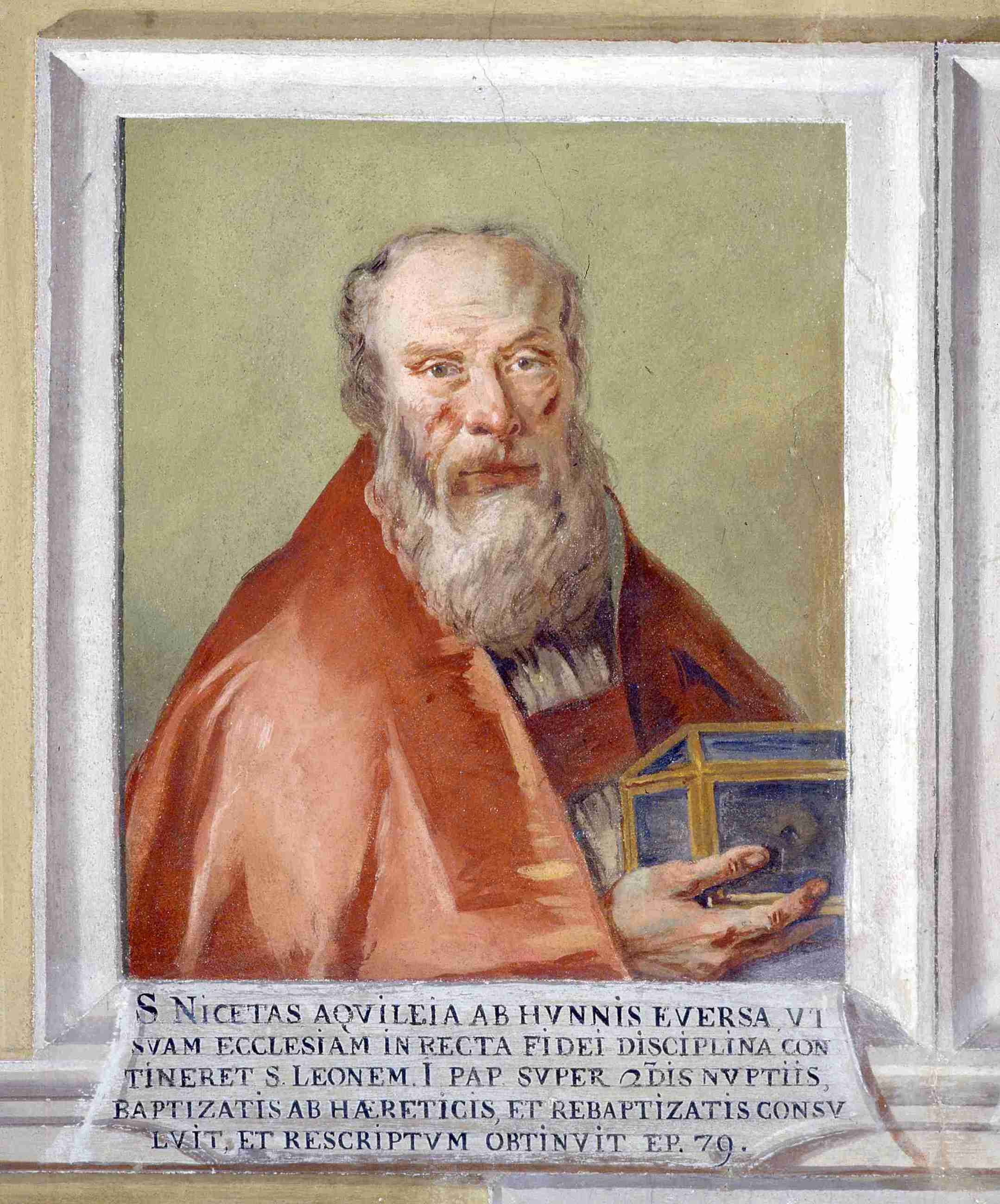 Niceta - Patriarcato Udine